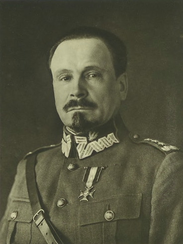 Generał Józef Haller von Hallenburg.